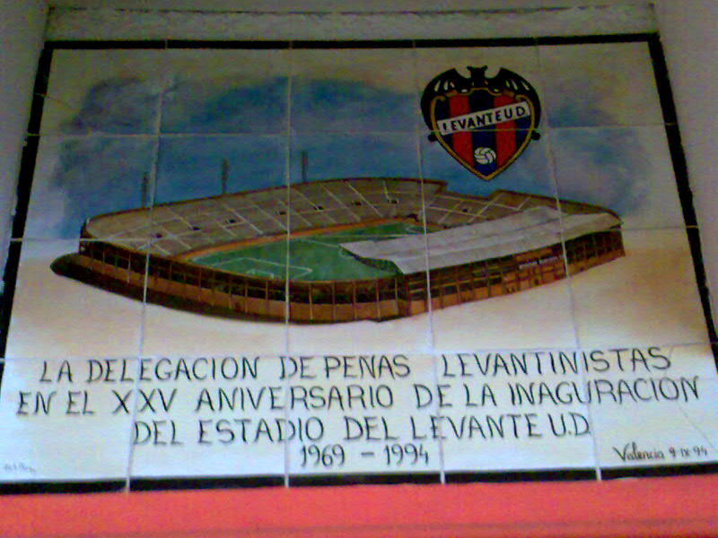 Mosaico dentro del Campo Ciudad de Valencia (Estadio del Levante UD)